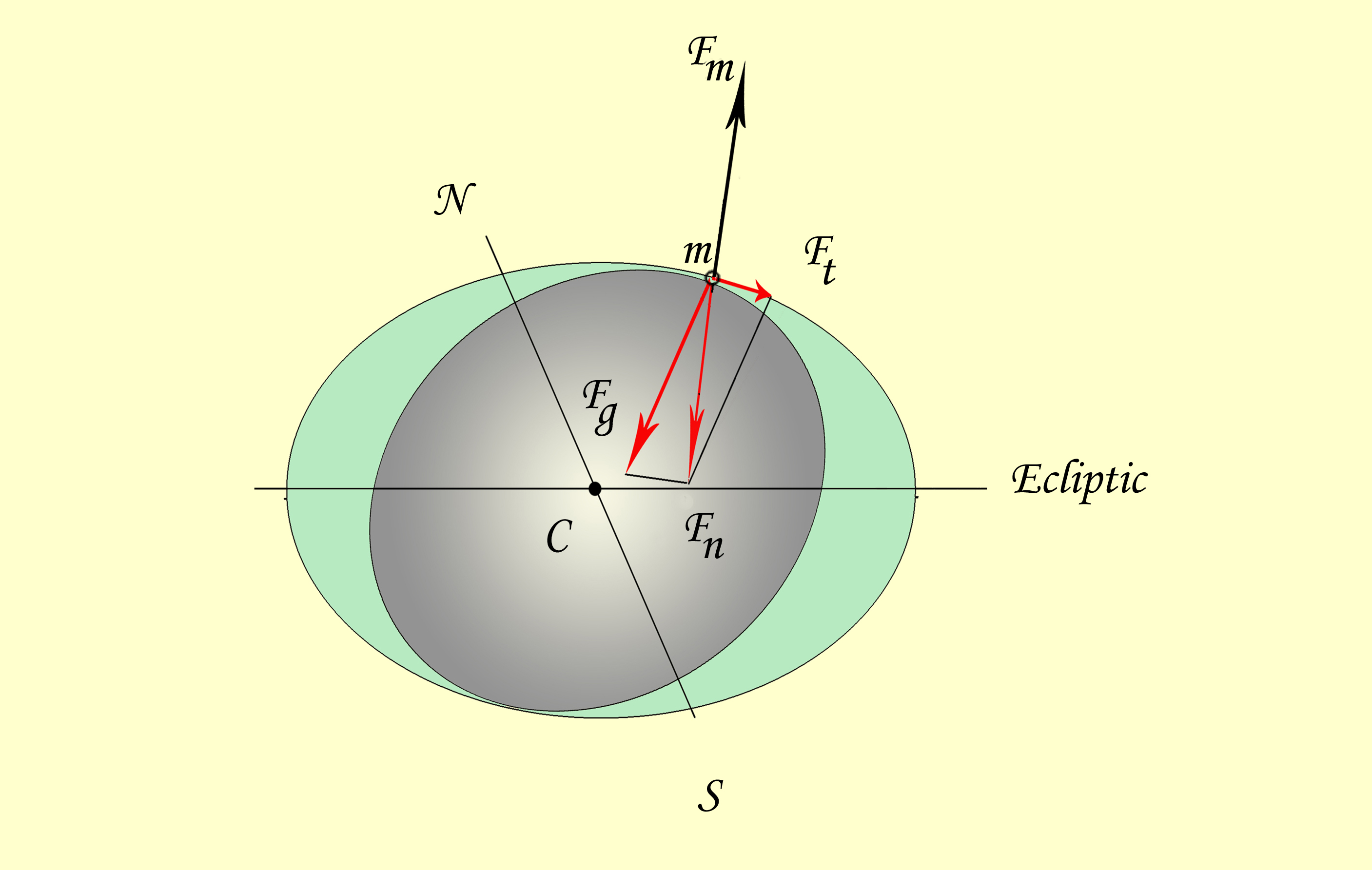 Earth water blanket deformation (By Klaus Lüders, Gerhard von Oppen. Lehrbuch der Experimentalphysic. Band I. 12 völlig bearbeitete Auflage. Walter de Gruyter. Berlin. New York. 2008. ISBN 978-3-11-019311-4 and Китайгородский А. И. Введение в физику. М: Изд.-во «Наука», гл. ред. физико-математической литературы. 1973